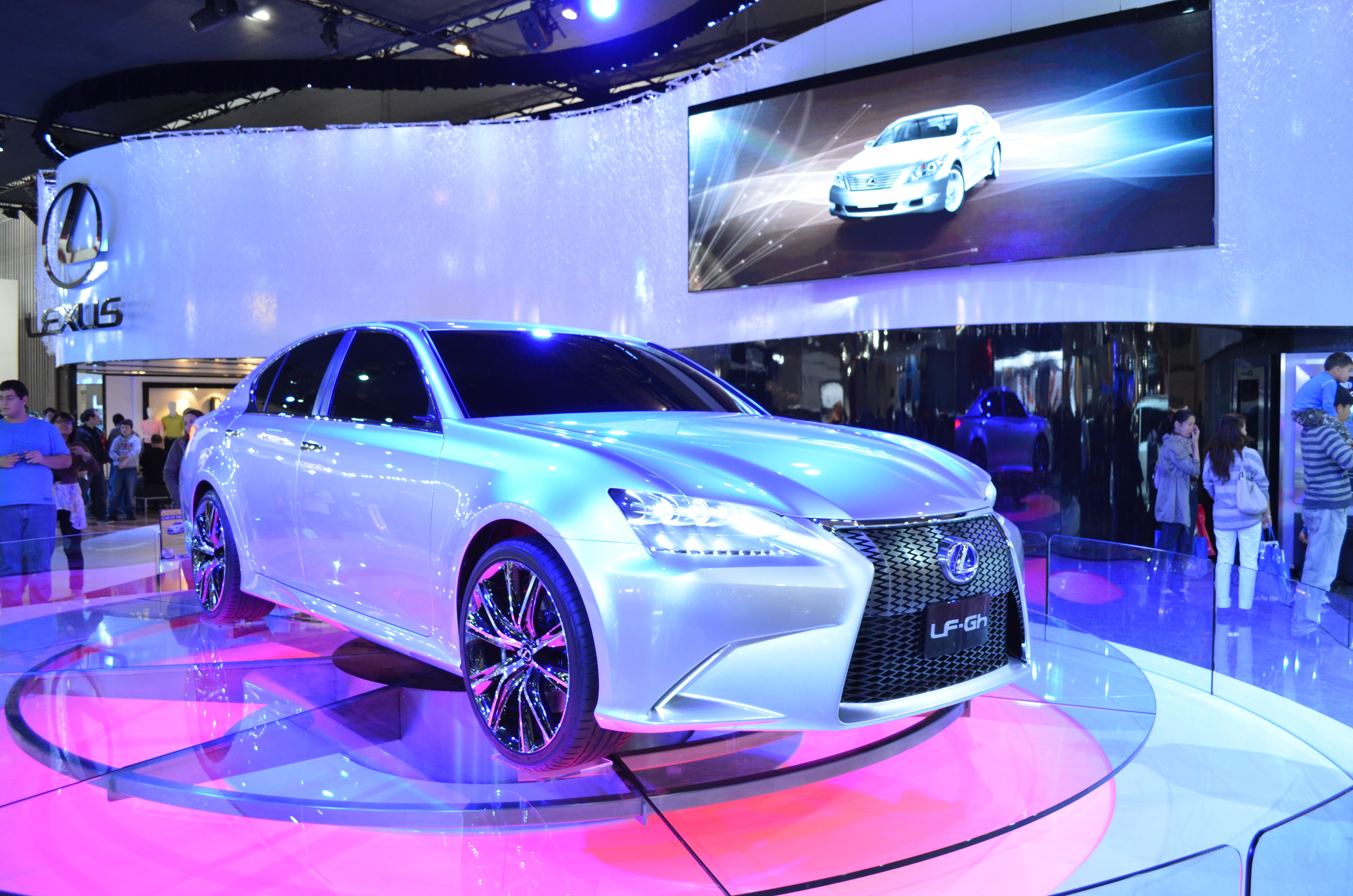 20110709_D5100 (377)